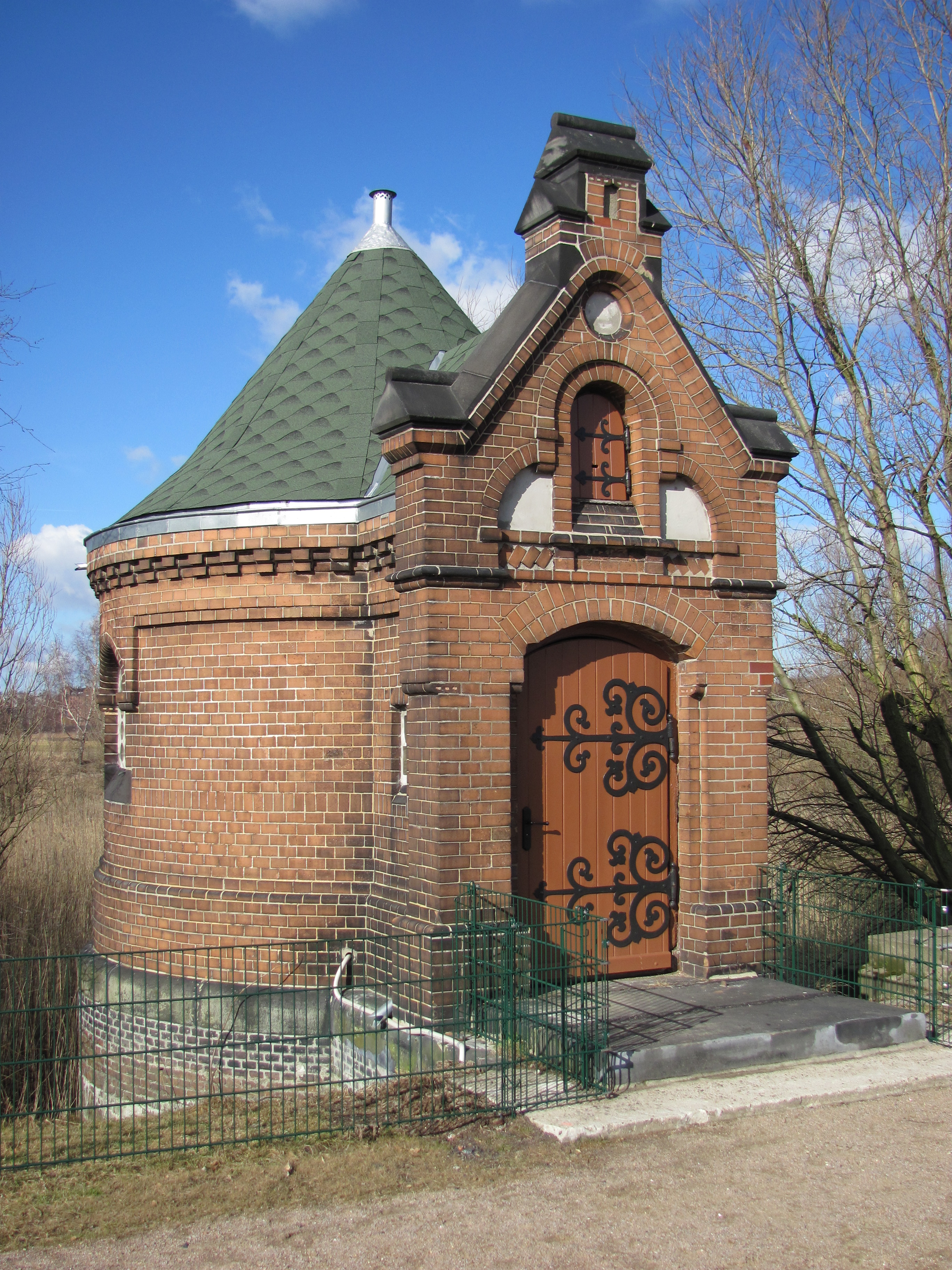 Schieberhäuschen im Wasserwerk Kaltehofe This is a photograph of an architectural monument.